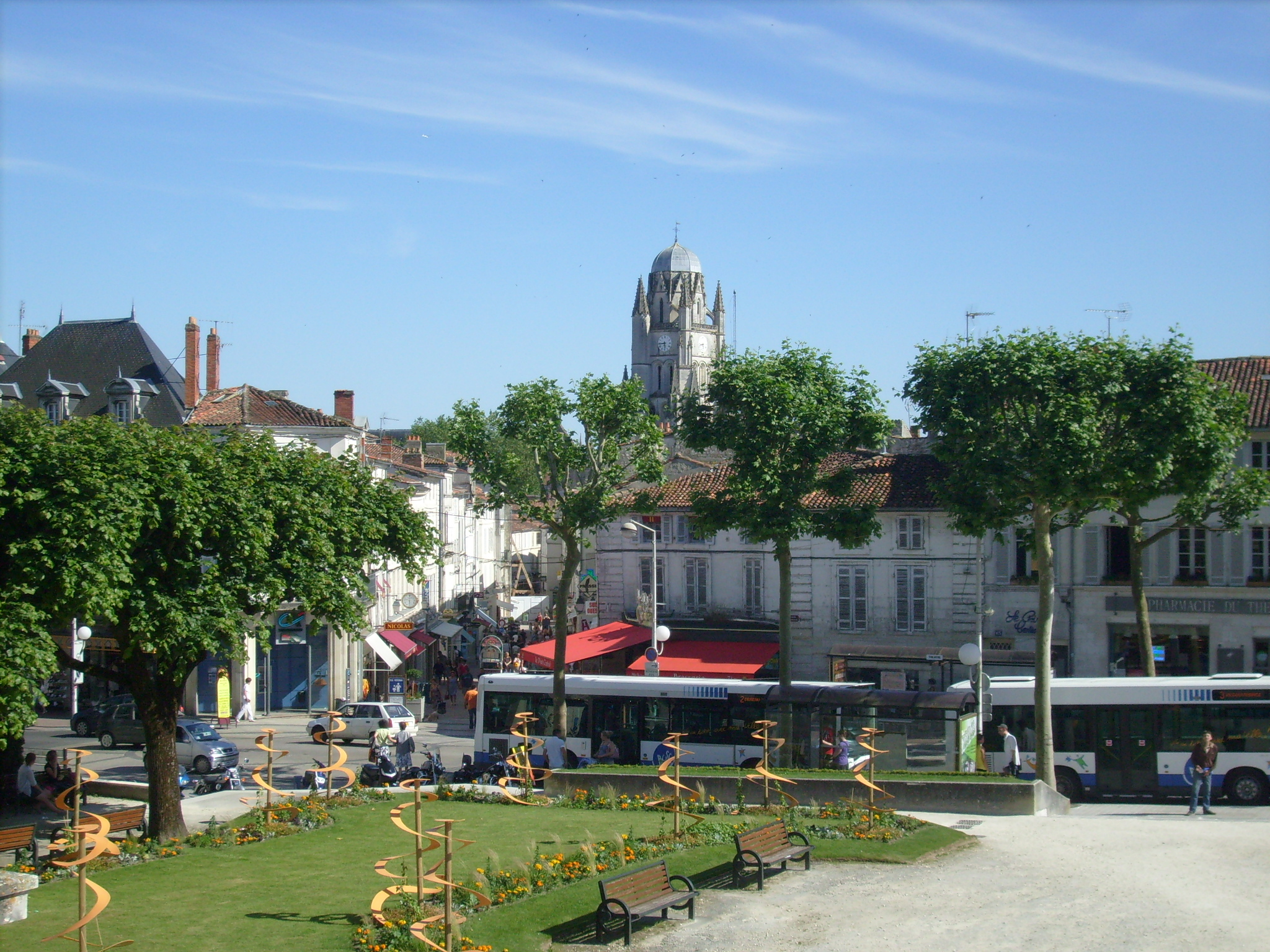 Centre-ville de Saintes